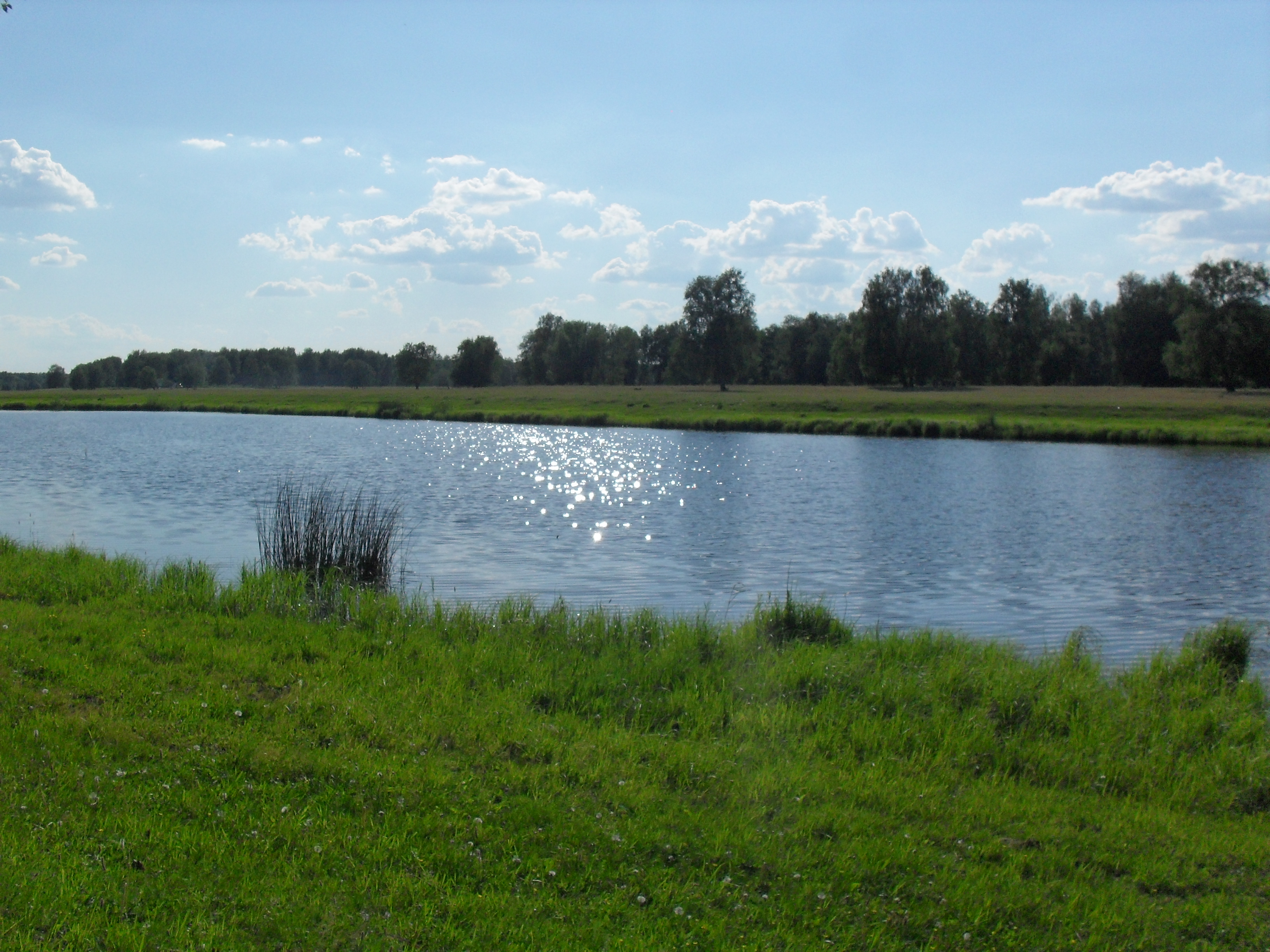 Степная катена: Памятник природы находится в 9 километрах к северо-западу от поселка Новый Баганенок в правобережье реки Баганенок на межколочной поляне,Краснозёрский район, Новосибирская область This image is related to the protected area of Russia number 5410070